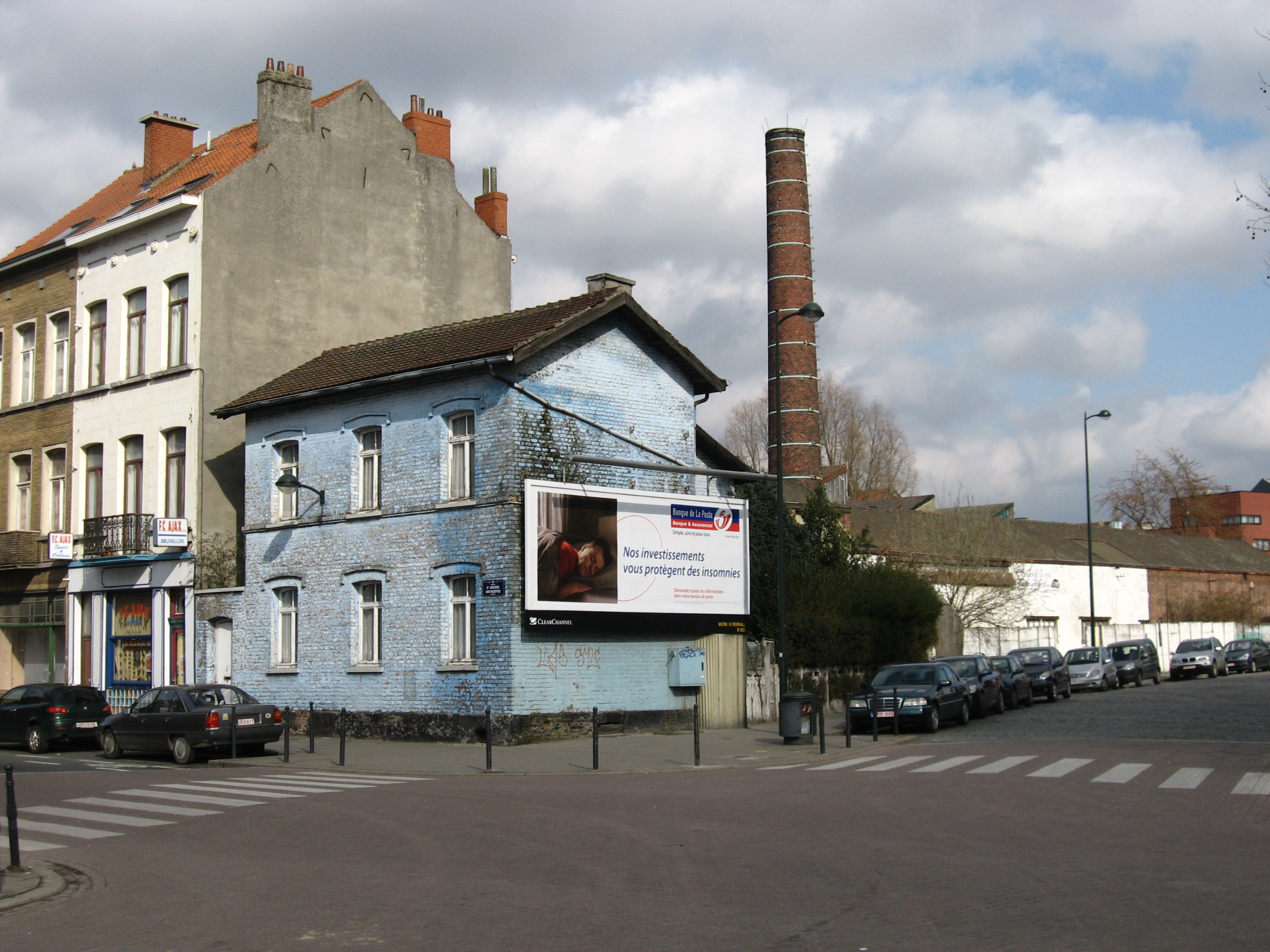 ex wachtershuis in Brussel Noord. Deze lag langs de opgeheven oorspronkelijke spoorlijn naar Groendreef. Er was een bewaakte overweg bij de kruising van het spoor met de Antwerpse Steenweg. Is nu een geklasseerd monument.